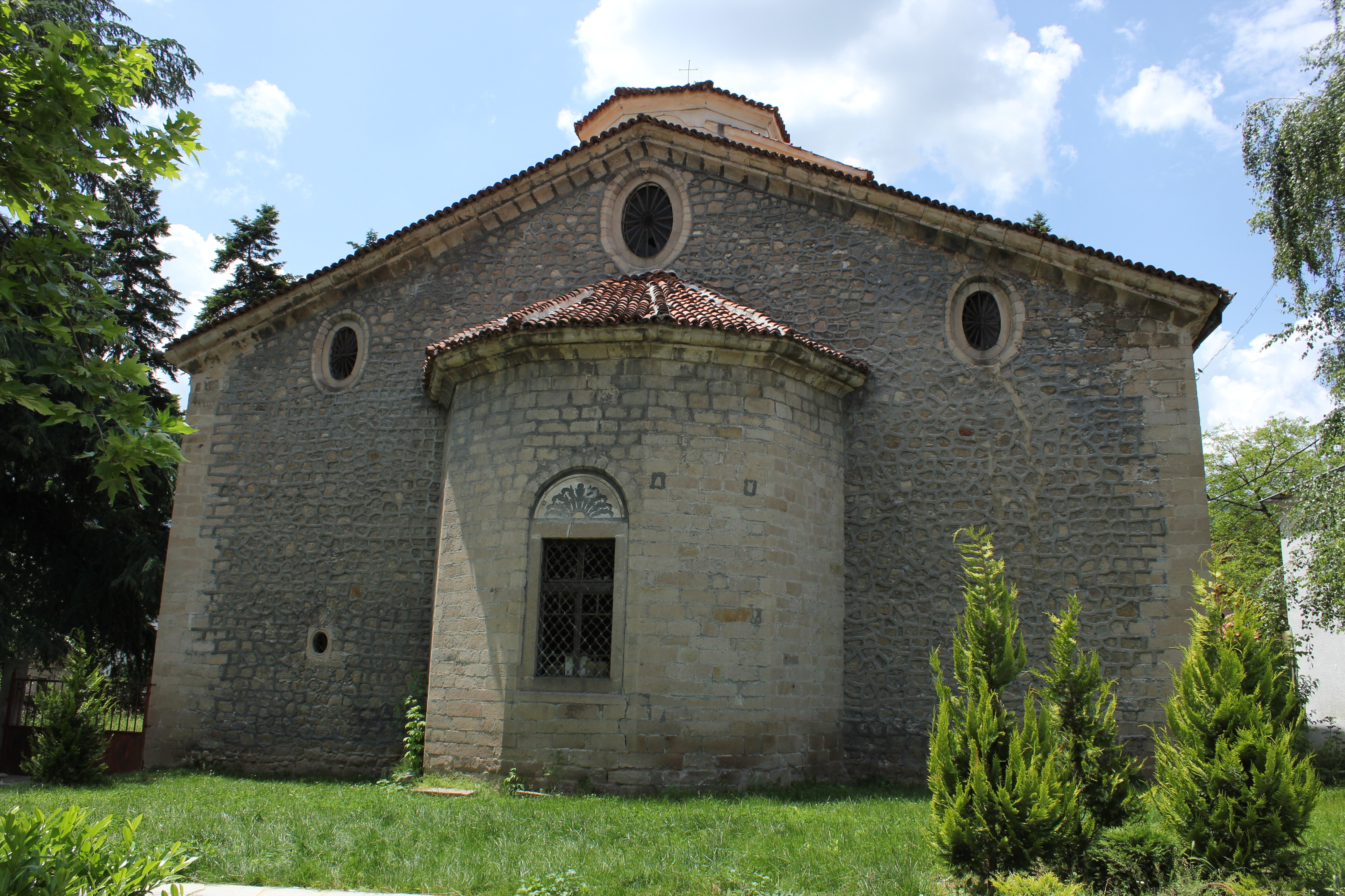 Черква „Св. Димитър" в град Пещера, България.